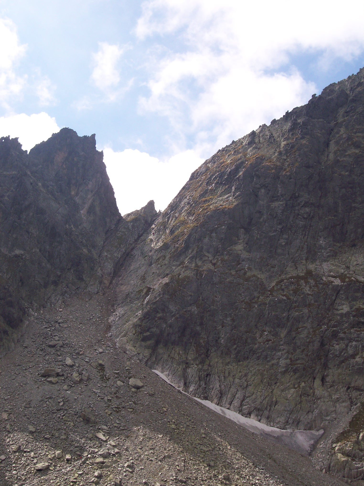 Priecne sedlo